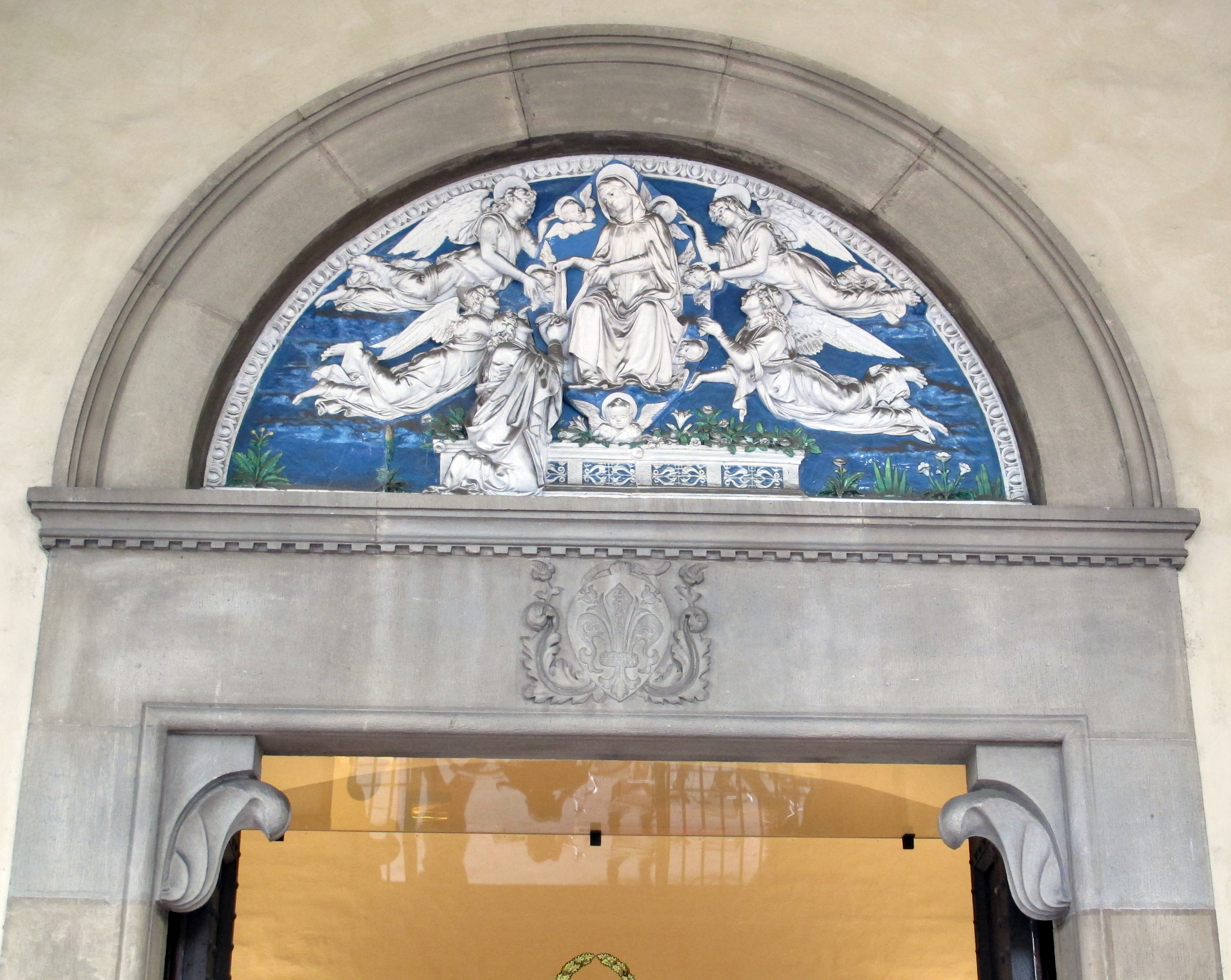 Firenze